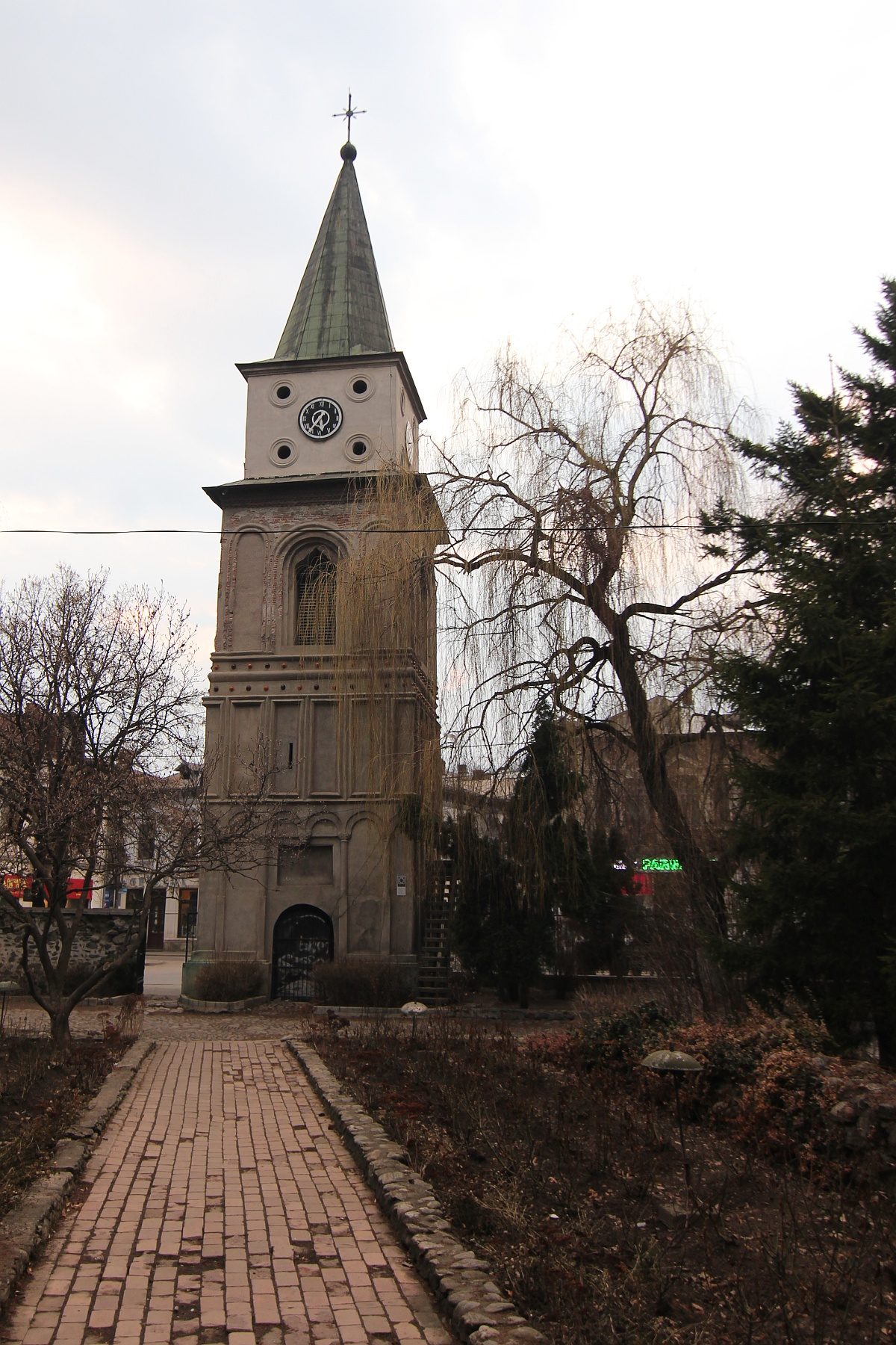 Turn clopotniță Sf. Iacob, Câmpulung 05